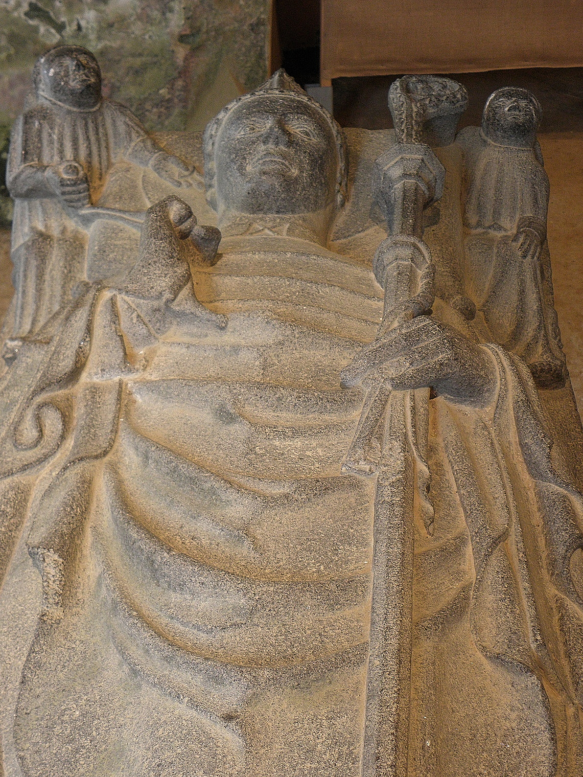 Gisant de Saint-Jaoua en la chapelle éponyme de Plouvien (29).